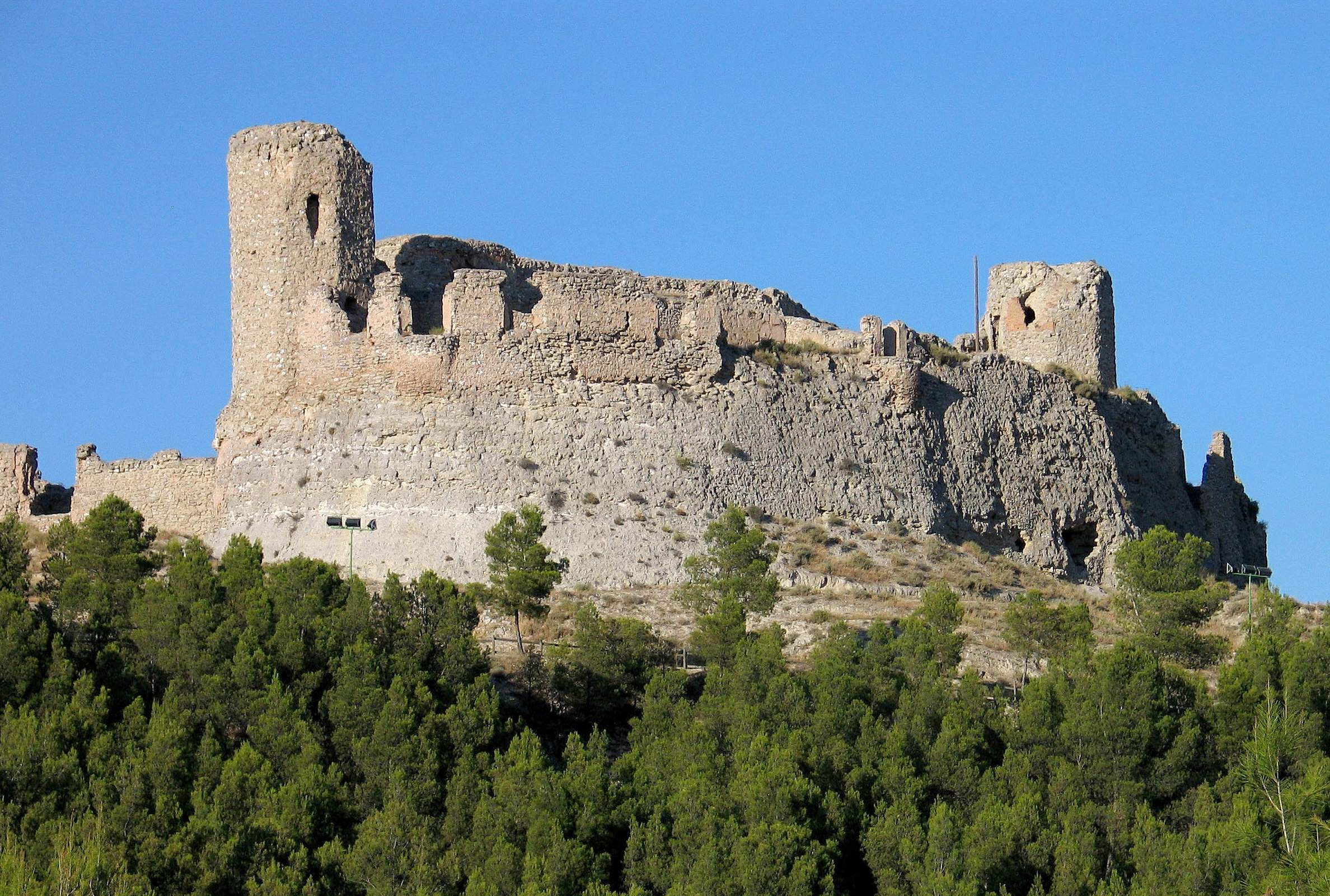 Castillo de Ayud (Calatayud).